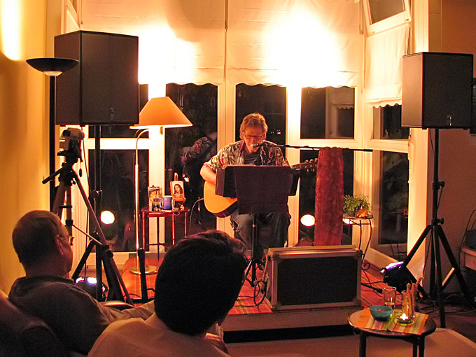 David Munyon beim Wohnzimmerkonzert in Senden